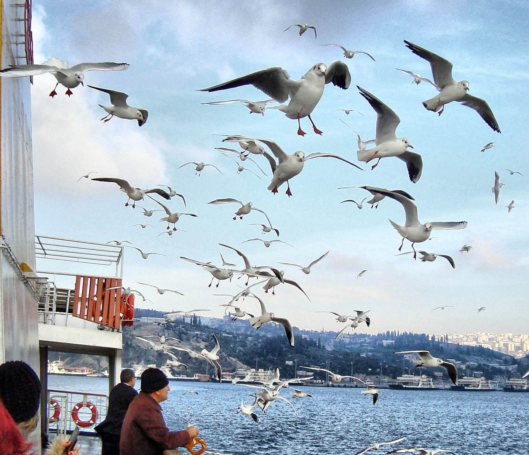 Martılar-Darıca-Yalova.